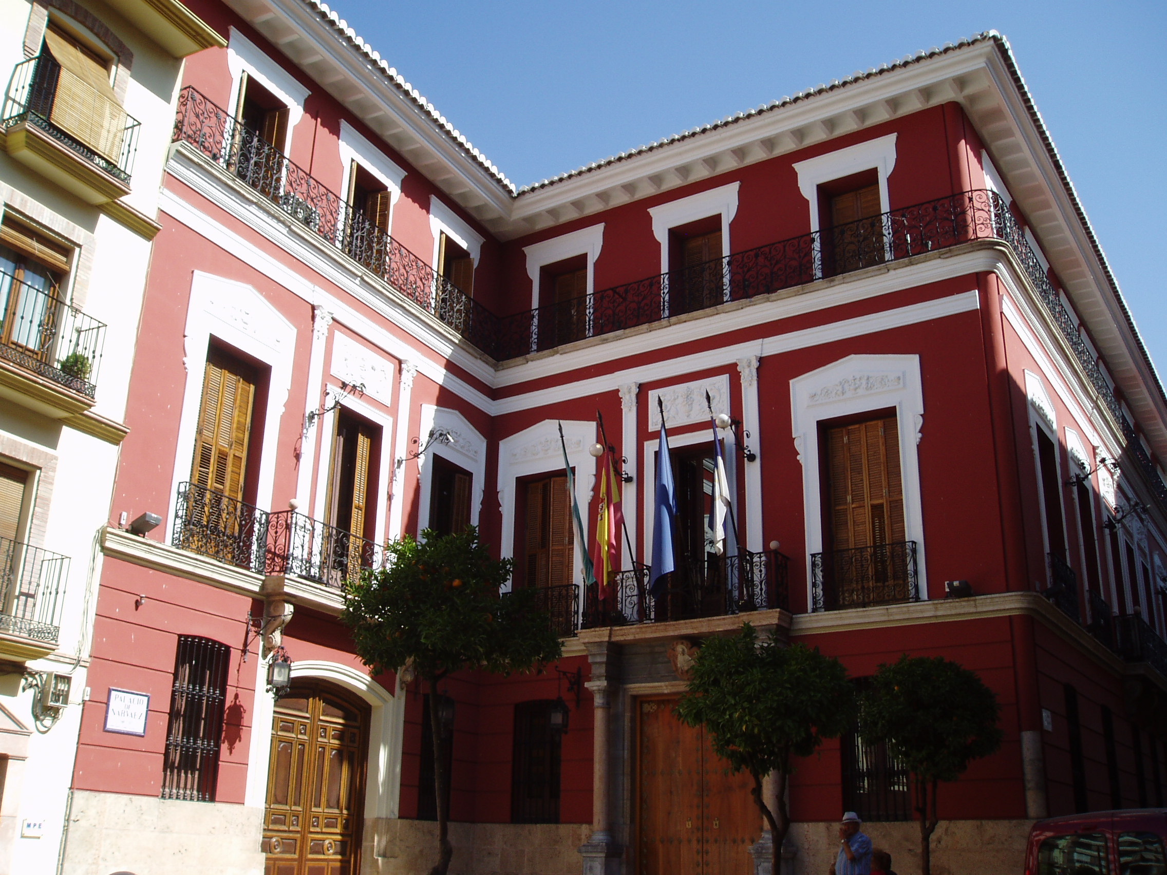 Palacio de Narváez de Loja (provincia de Granada). Palacete del siglo XIX actualmente sede del ayuntamiento de la ciudad. Esta construcción fue encargada a un arquitecto francés por el General Narváez como residencia personal. En su interior conserva un patio central porticado de forma cuadrada en el centro del cual hubo una fuente de taza de mármol de Carrara. Sobre las columnas aparecen medallones representativos de ilustres personajes de la historia de España. Entre los objetos conservados en esta edificación se encuentra el arcón de los Claveros de la Alcaldía, el mobiliario de la alcaldía y salón de plenos, el pendón de la ciudad, un cuadro al óleo con imagen de santos y otros de Narváez, Alfonso XII, Alfonso XIII y una acuarela del siglo XVIII sobre el sistema defensivo. Fue rehabilitado en 1993.